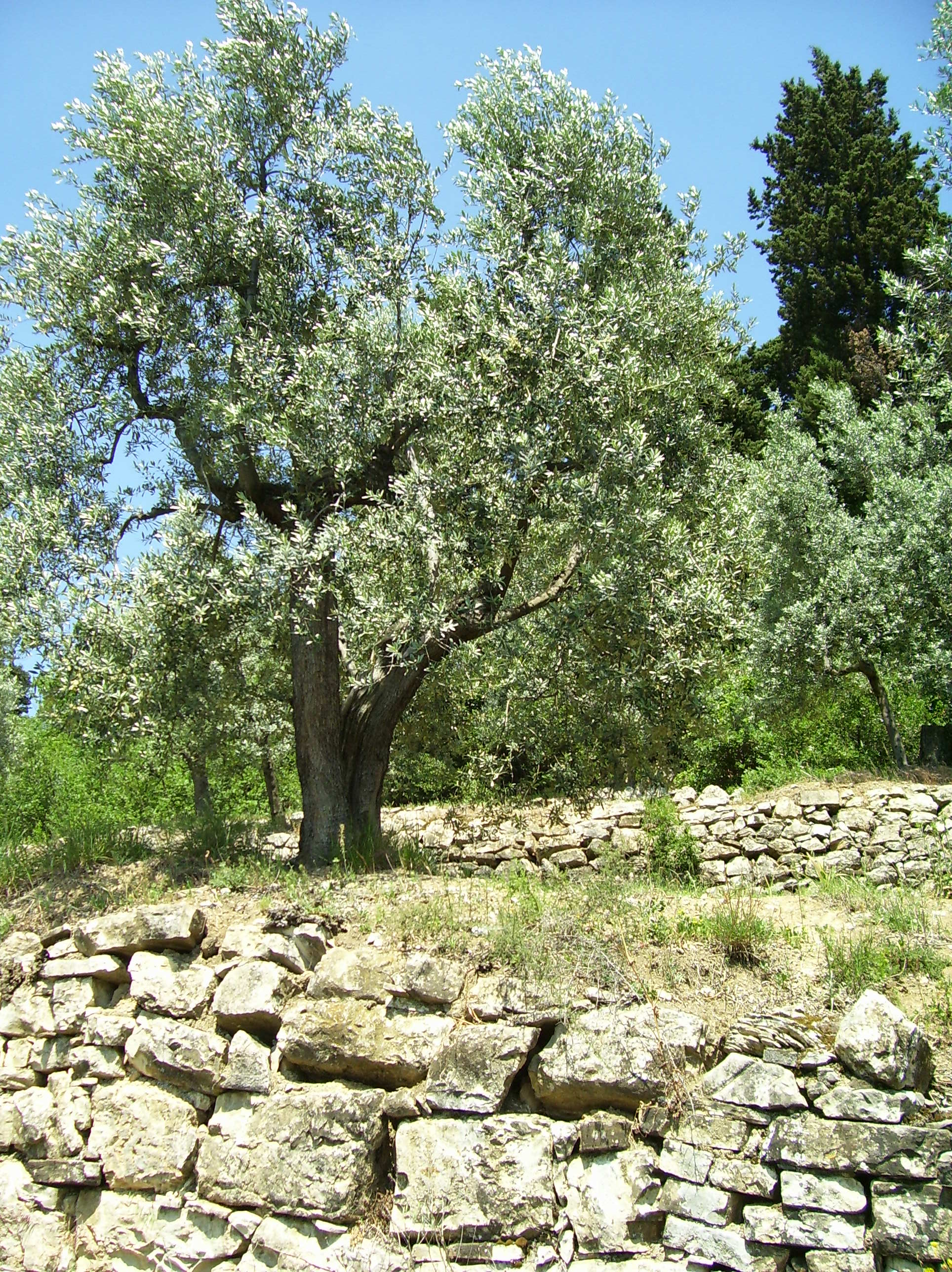 Olivi coltivati su terrazzamenti sostenuti da muri a secco, vicino Prato